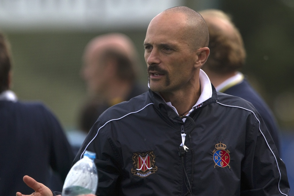 Final del partit Athc Terrassa-R.C.Polo en la temporada 2012-13